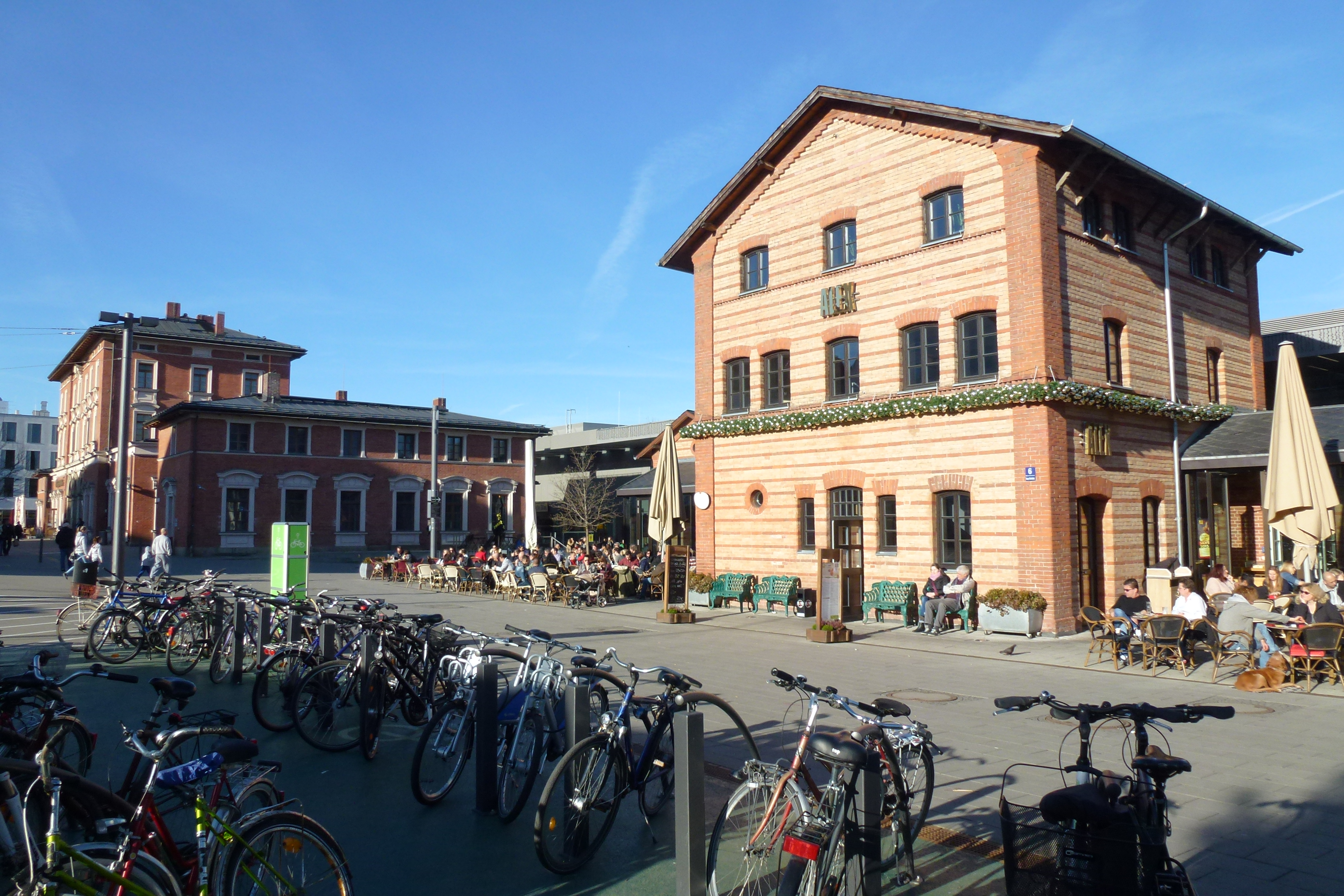 Ansicht des Alten Pasinger Bahnhofs (Neuer Bahnhof im Hintergrund)